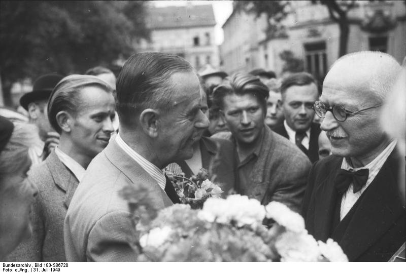 ADN-ZB-Illus- Thomas Mann in Weimar Am Sonntag nachmittag (31.7.1949) traf Thomas Mann aus Westdeutschland kommend, in Weimar ein, wo er vor dem Hotel "Augusta" durch den thüringischen Ministerpräsidenten Werner Eggerath und Frau Dr. Thorhorst begrüßt wurde. U. B. z: Thomas Mann wird von seinen engeren Freunden aus Zürich begrüßt. 3658 - 49